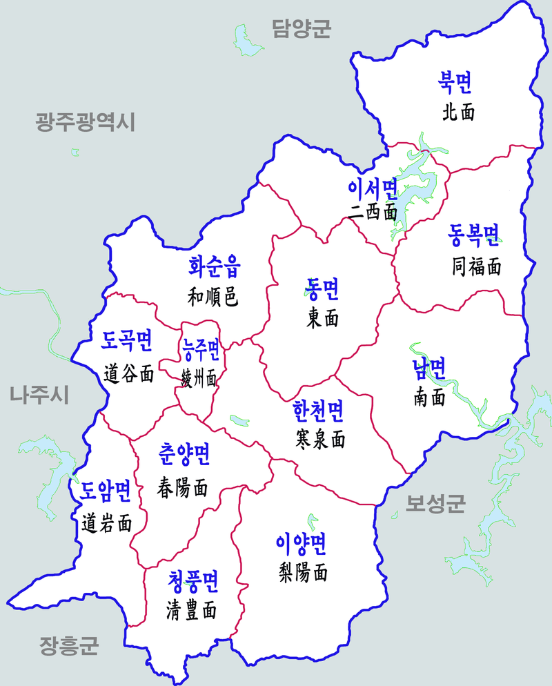 전남 화순군 행정구역도